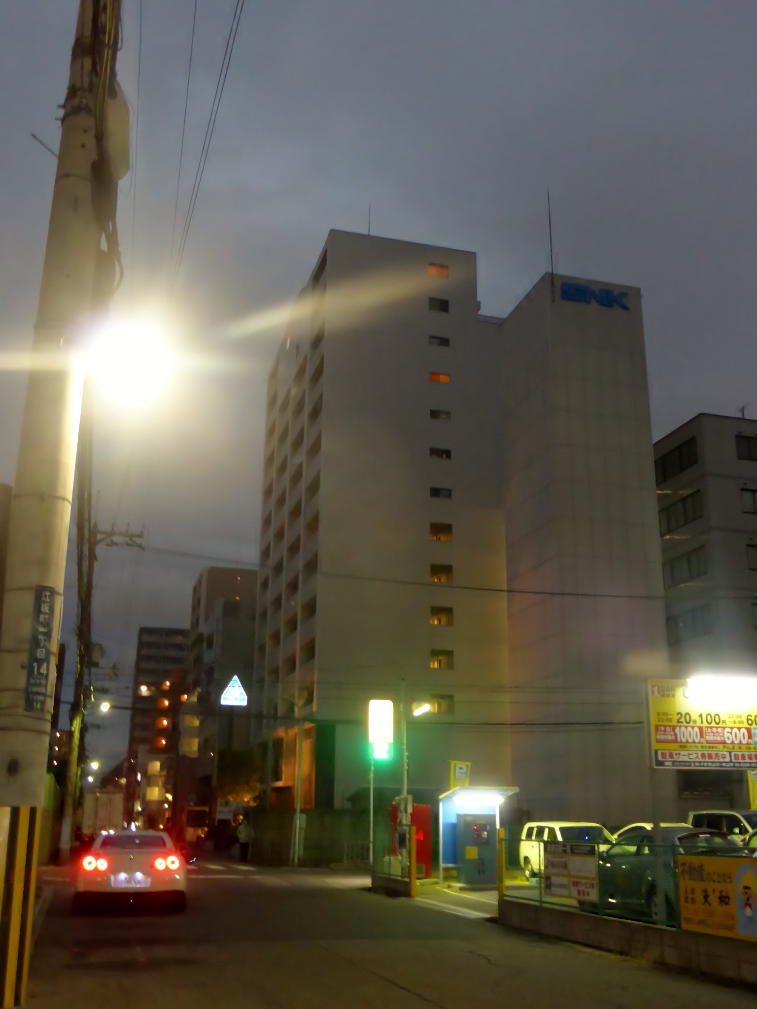 株式会社SNKプレイモア本社を撮影。